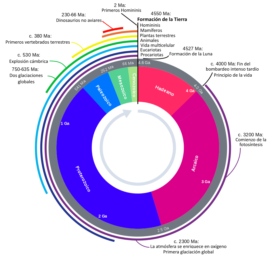 Reloj geológico con los periodos y eventos más importantes